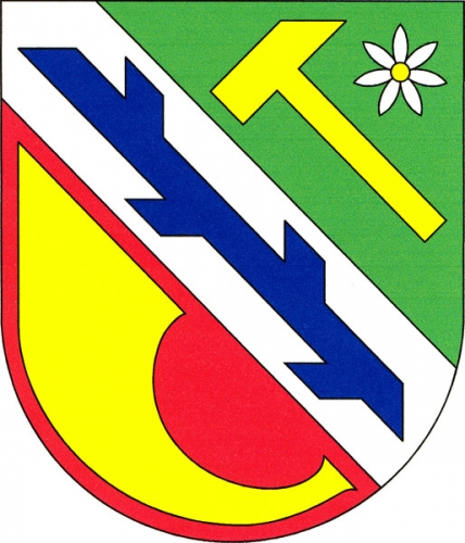 znak, Polnička, okres Žďár nad Sázavou